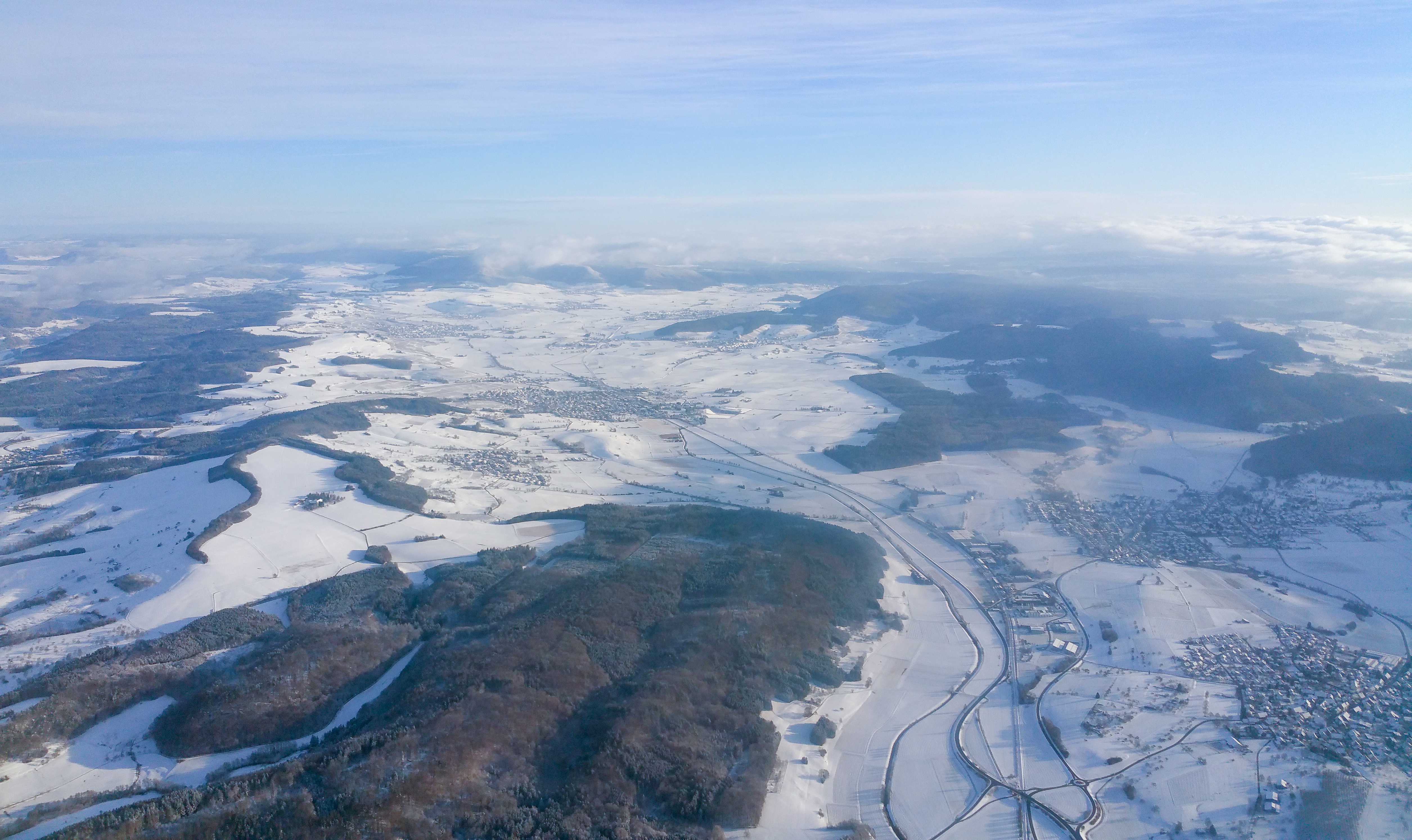 Germany, Baden-Württemberg, approach into ZRH across the Southern part of Black Forest, ACHTUNG: Entgegen der Bildbenennung handelt es sich hier um die Ortschaften der Gemeinde Klettgau.